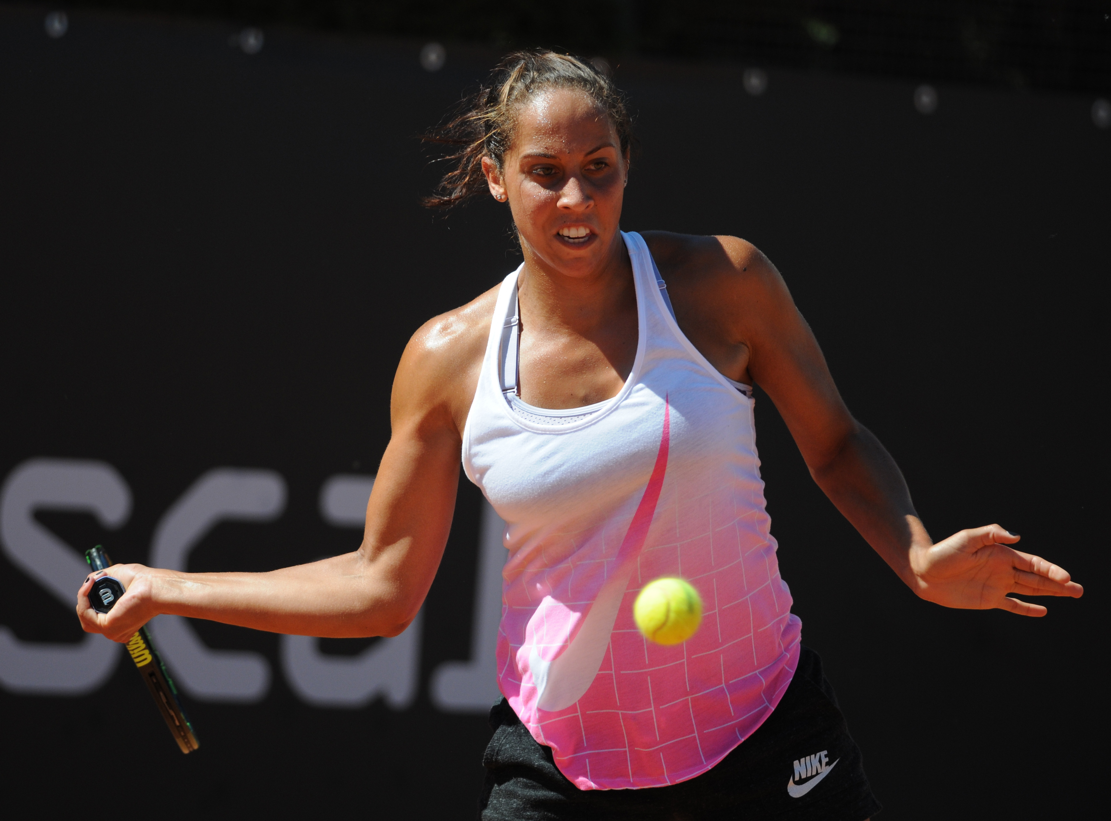 Madison Keys